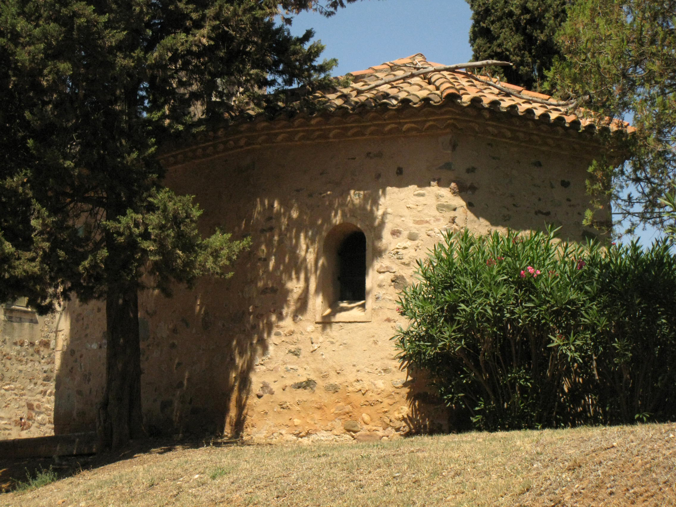 Capella de Mossèn Doms (Terrassa)